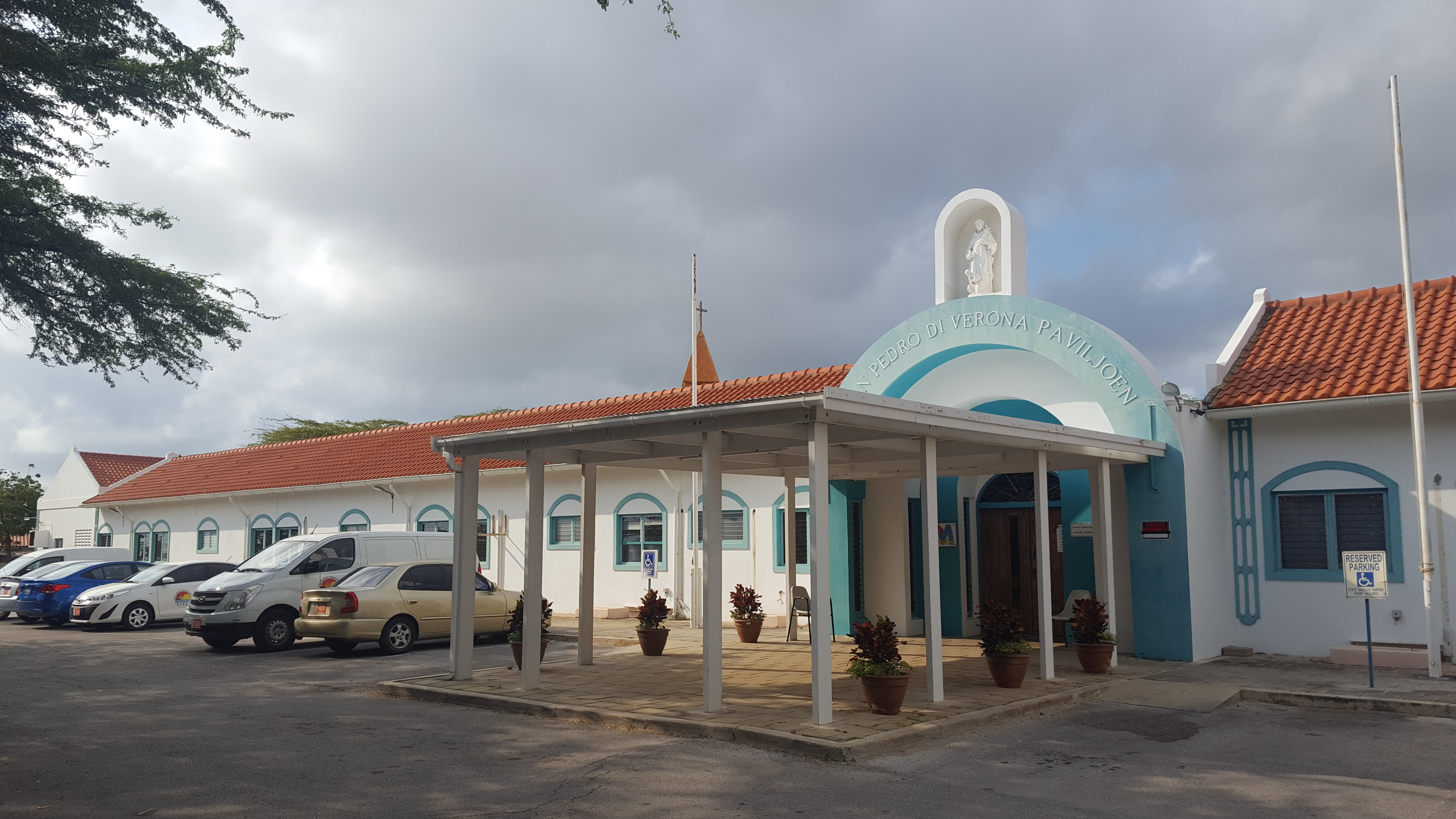 voormalige ziekenhuis te Oranjestad, Aruba in 1920 geopend onder leiding van katholieke nonnen. Sinds 1977 in gebruik als verpleegtehuis voor bejaarden.